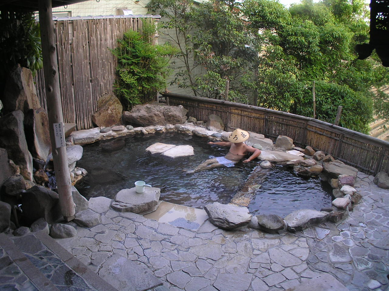 加古川温泉みとろ荘露天風呂（展望風呂）